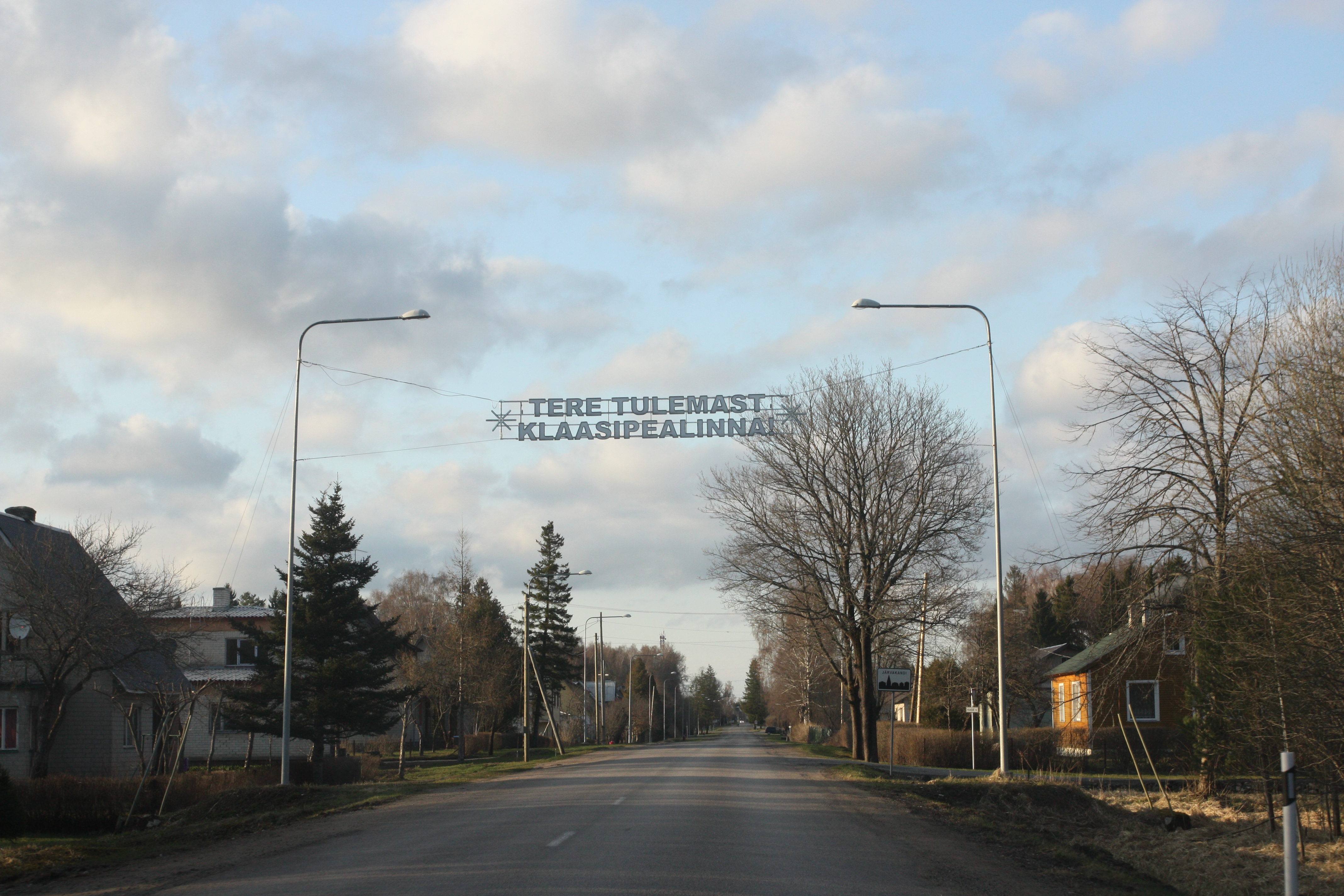 Sissesõit Järvakanti